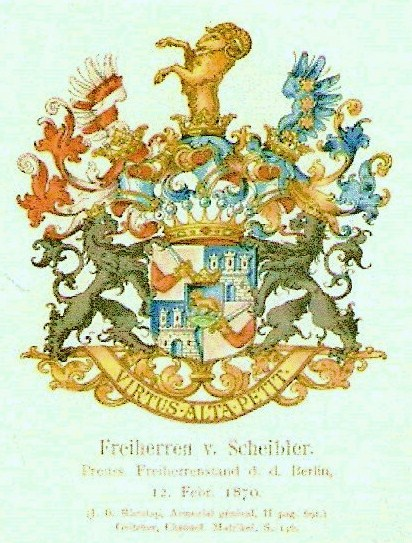 Scan eins Wappens aus dem Familienbuch